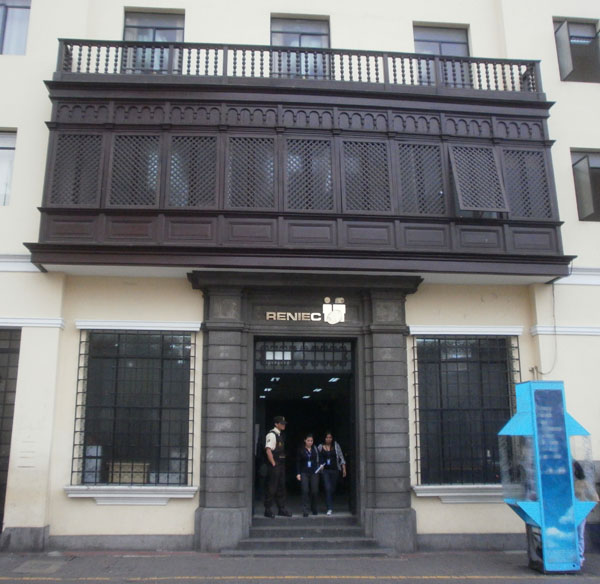 Fotografía tomada a la seded del RENIEC en Jr. Ancash - Lima, Perú